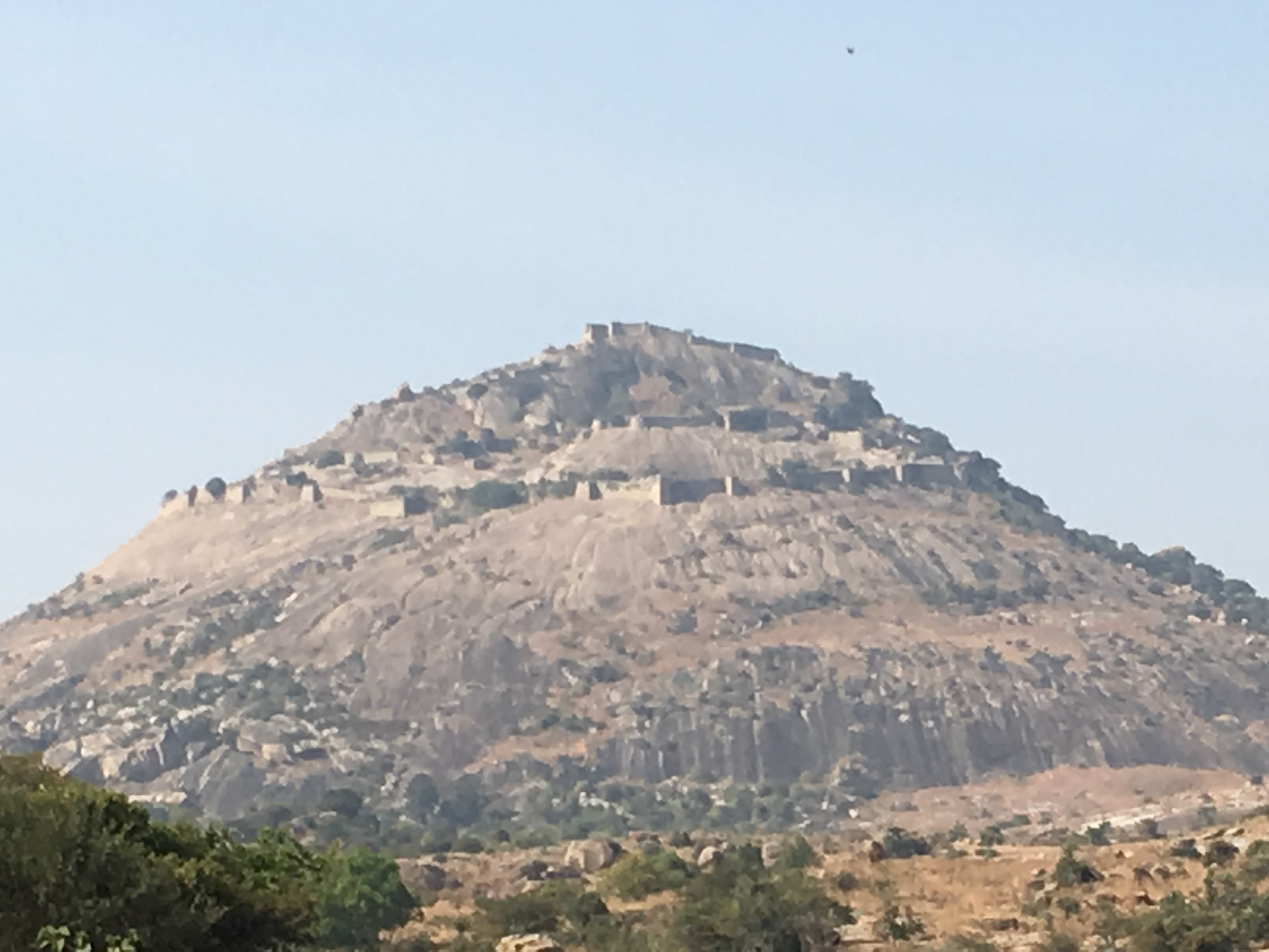 ಕನ್ನಡ: ಚನ್ನರಾಯನದುರ್ಗ ಬೆಟ್ಟದ ಕೋಟೆ